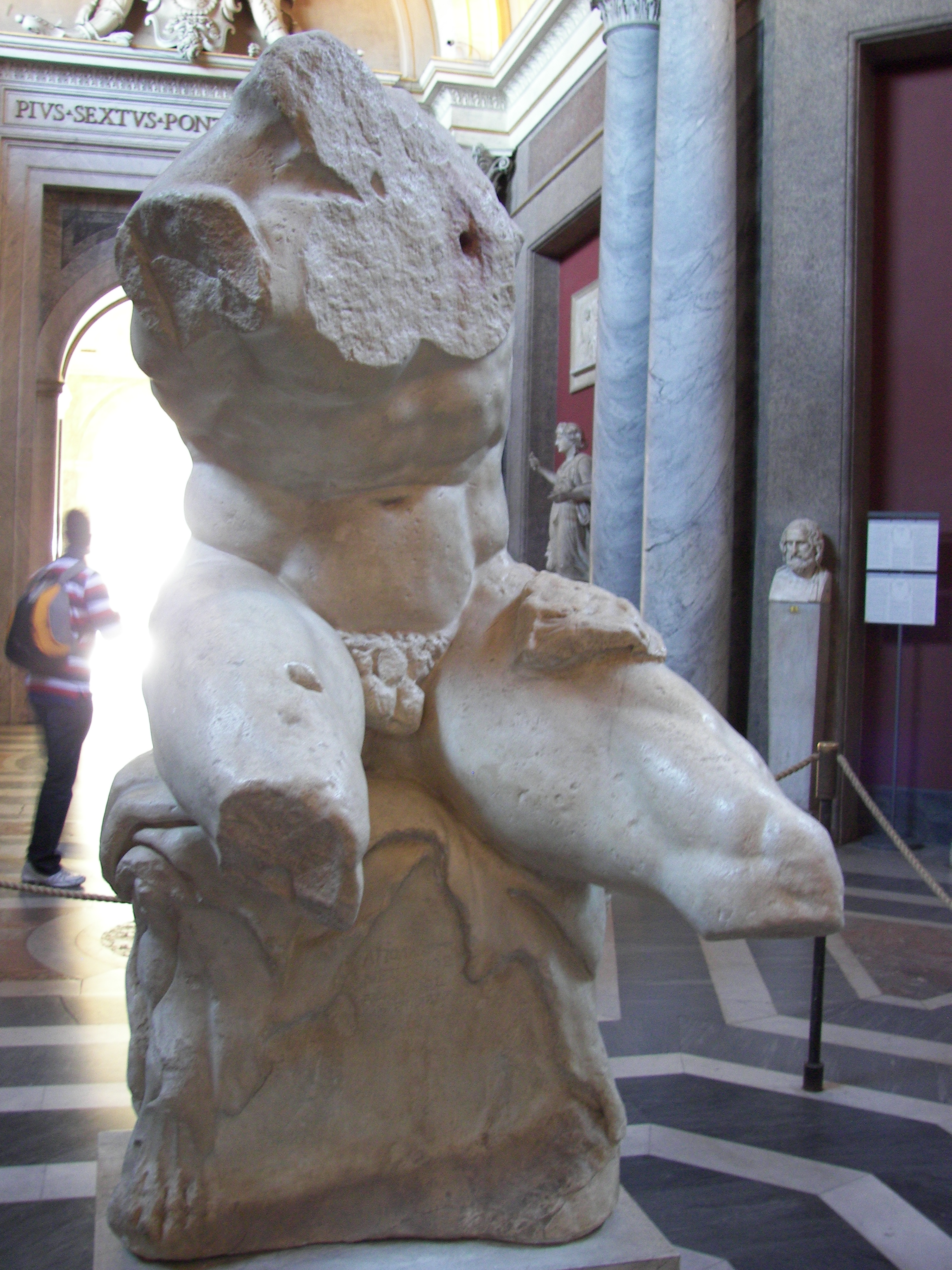 Belvedere Torso in Museo Pio-Clementino.